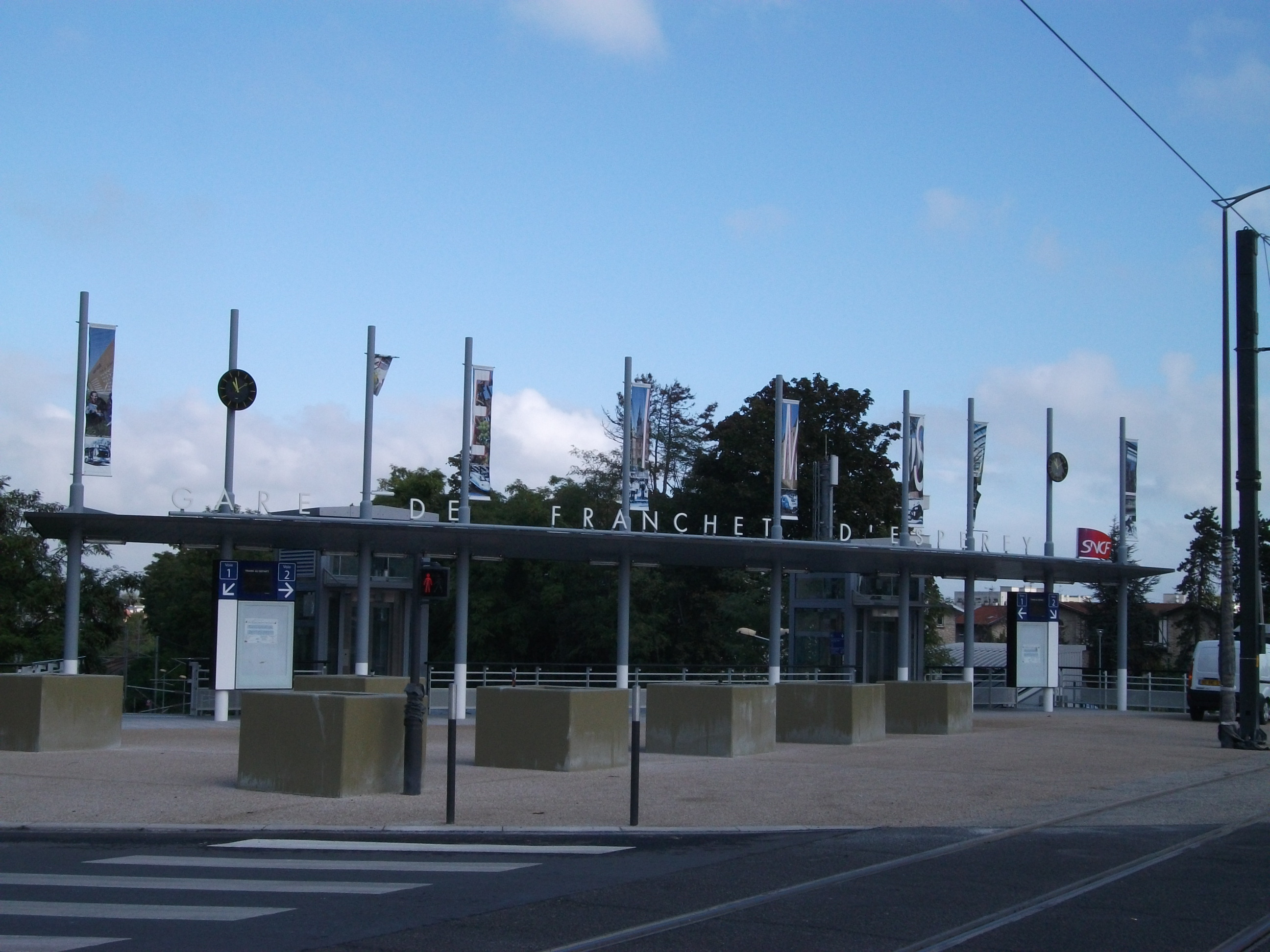 gare T.E.R Franchet d'Espérey de Reims desservant le campus Croix Rouge.